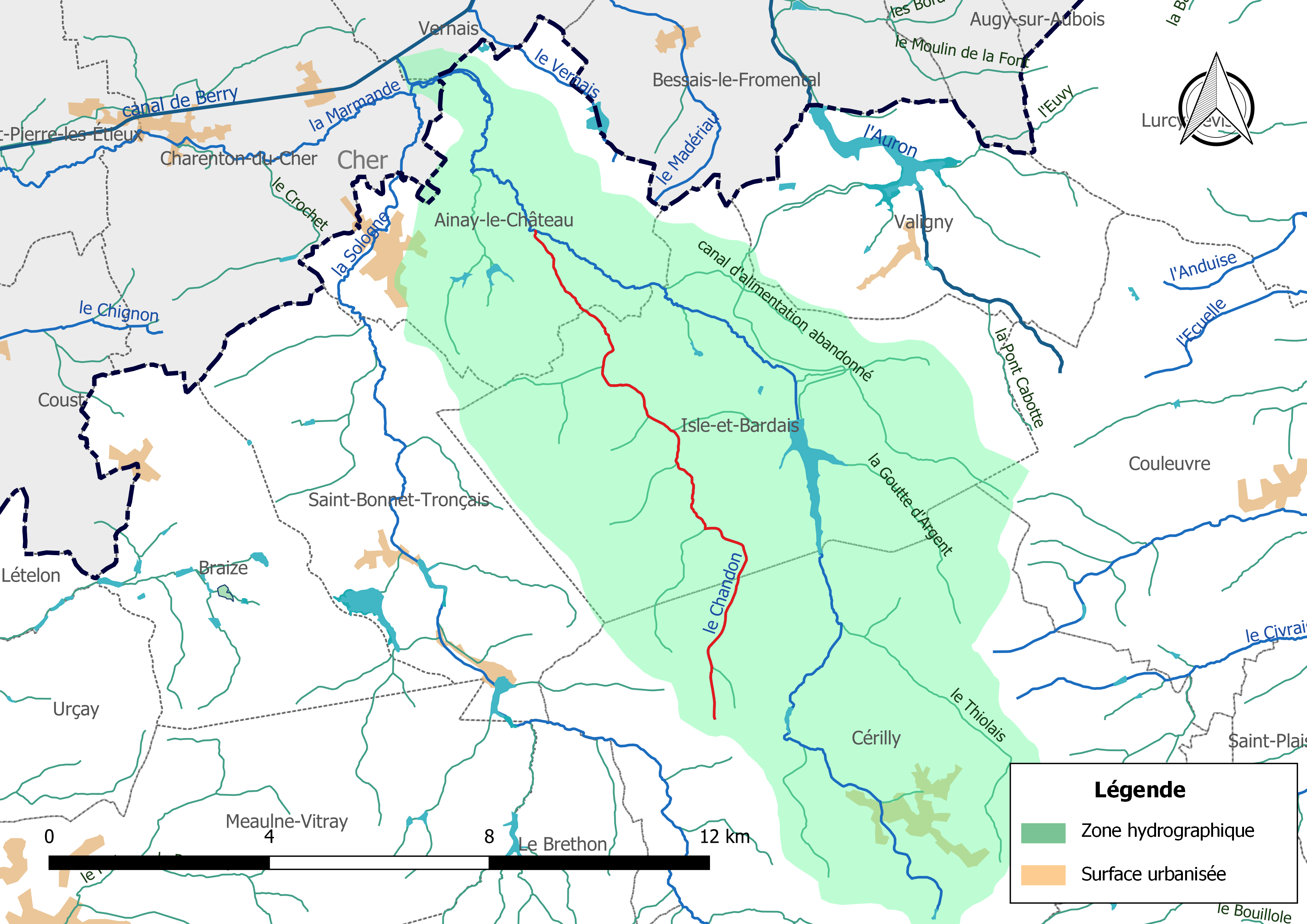 Carte du cours d'eau « le Chandon » (France) et de la zone hydrographique dans laquelle il s'insère.